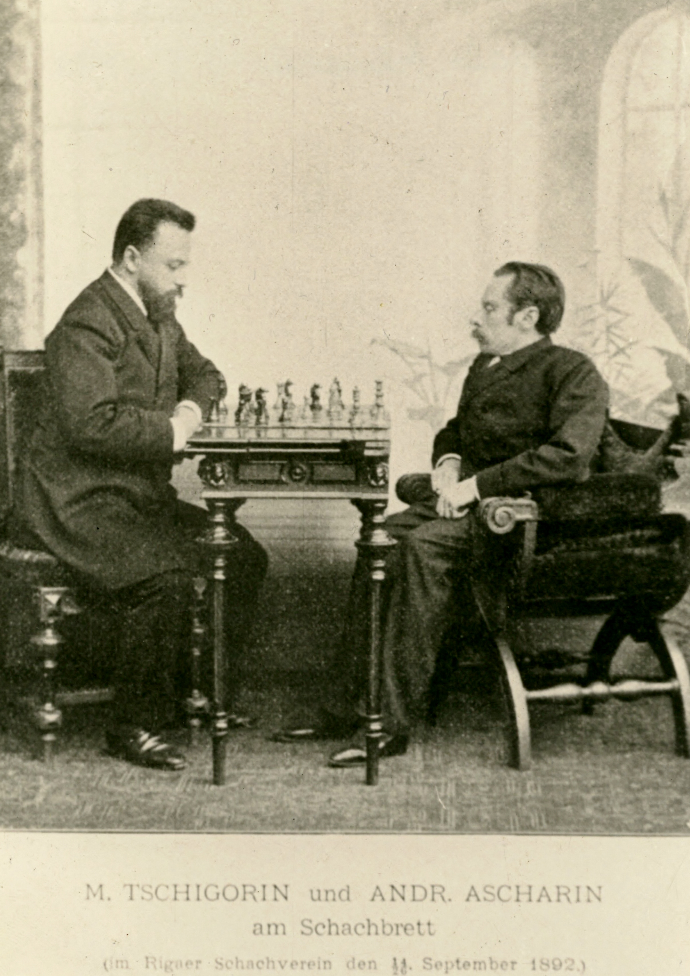 Mihhail Tšigorin ja Andrej Ašarin maletamas Riias septembris 1892